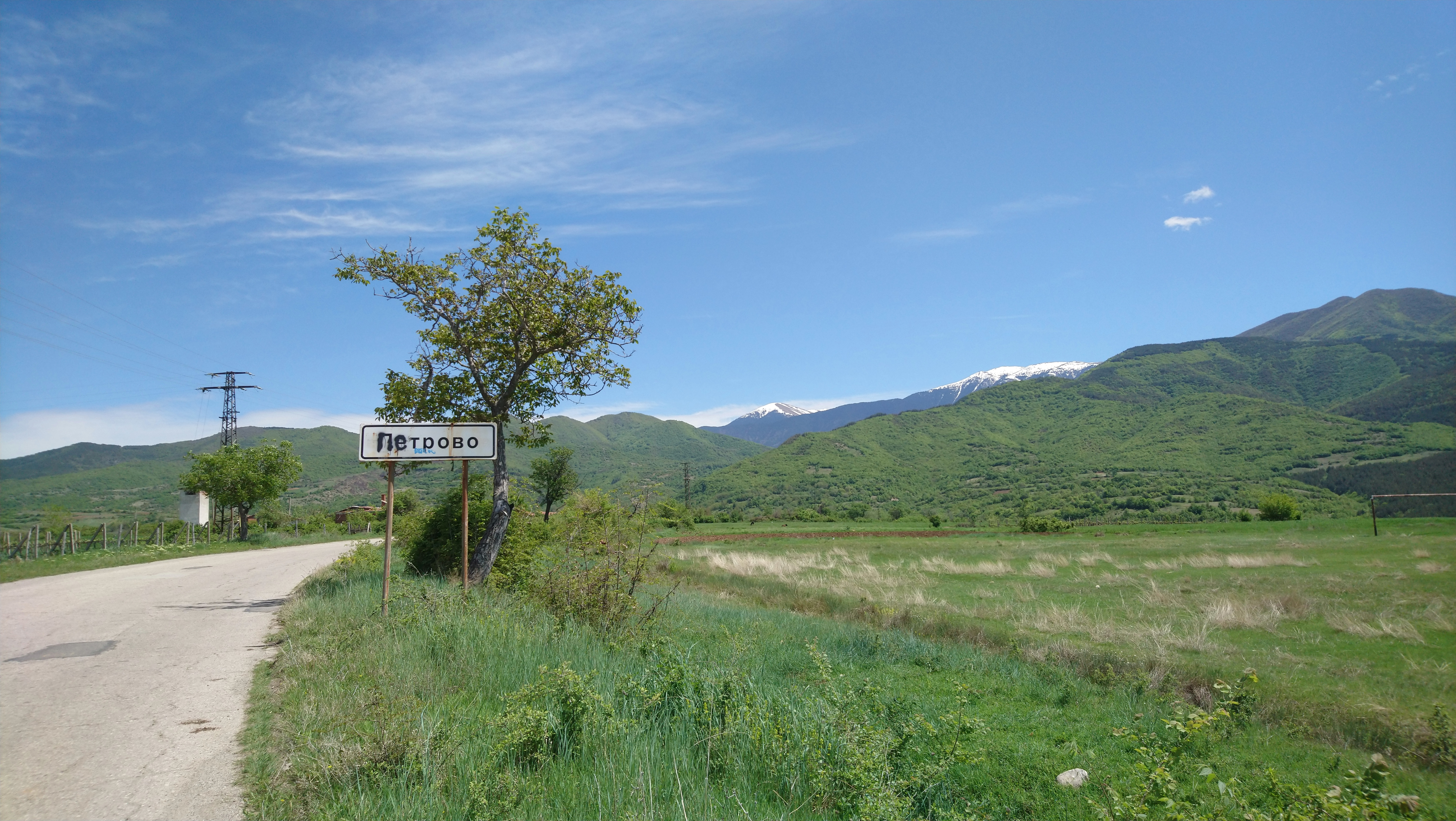 Табелата на входа на село Петрово, област Благоевград